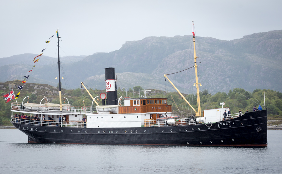 "Stord I" segler inn på Florø havn til Fjordsteam 2015.